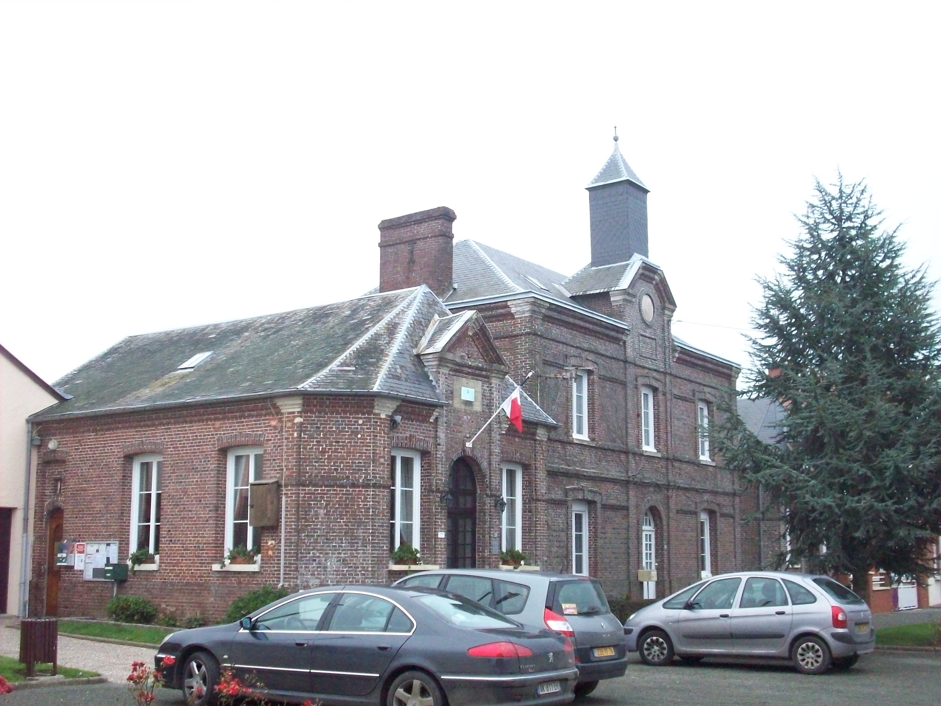 Mairie de Beauvoir-en-Lyons, en symétrie avec l'école communale, avec un logement les séparant.